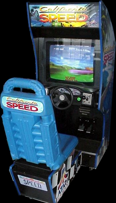 maquina